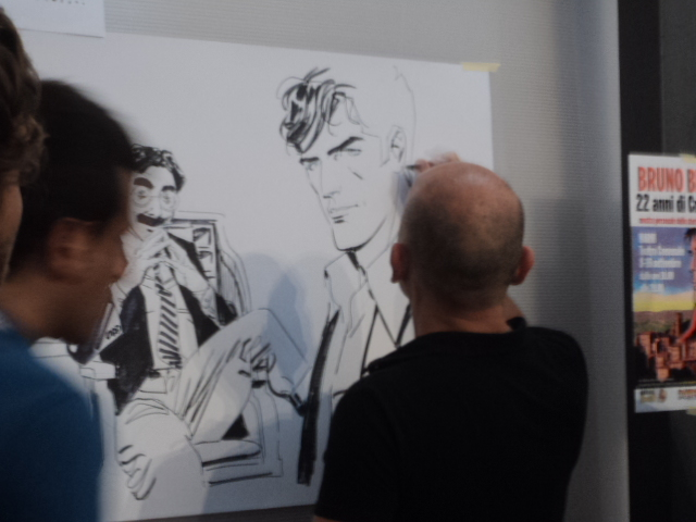 Bruno Brindisi a Narni 2012